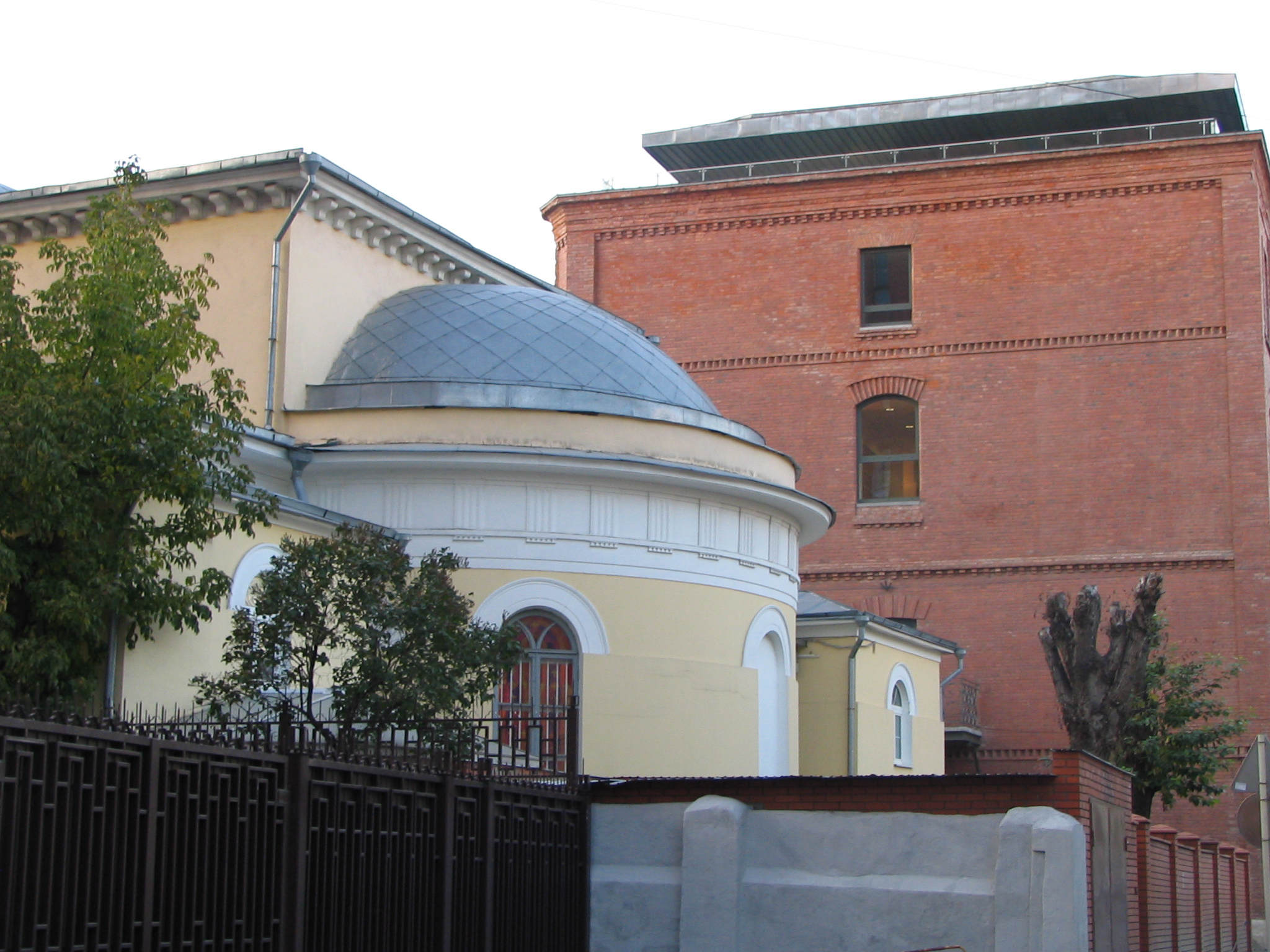 Miliutinsky,7. Moscow